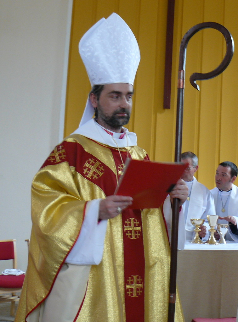 Zdjęcie z konsekracji biskupa Szymona Niemca